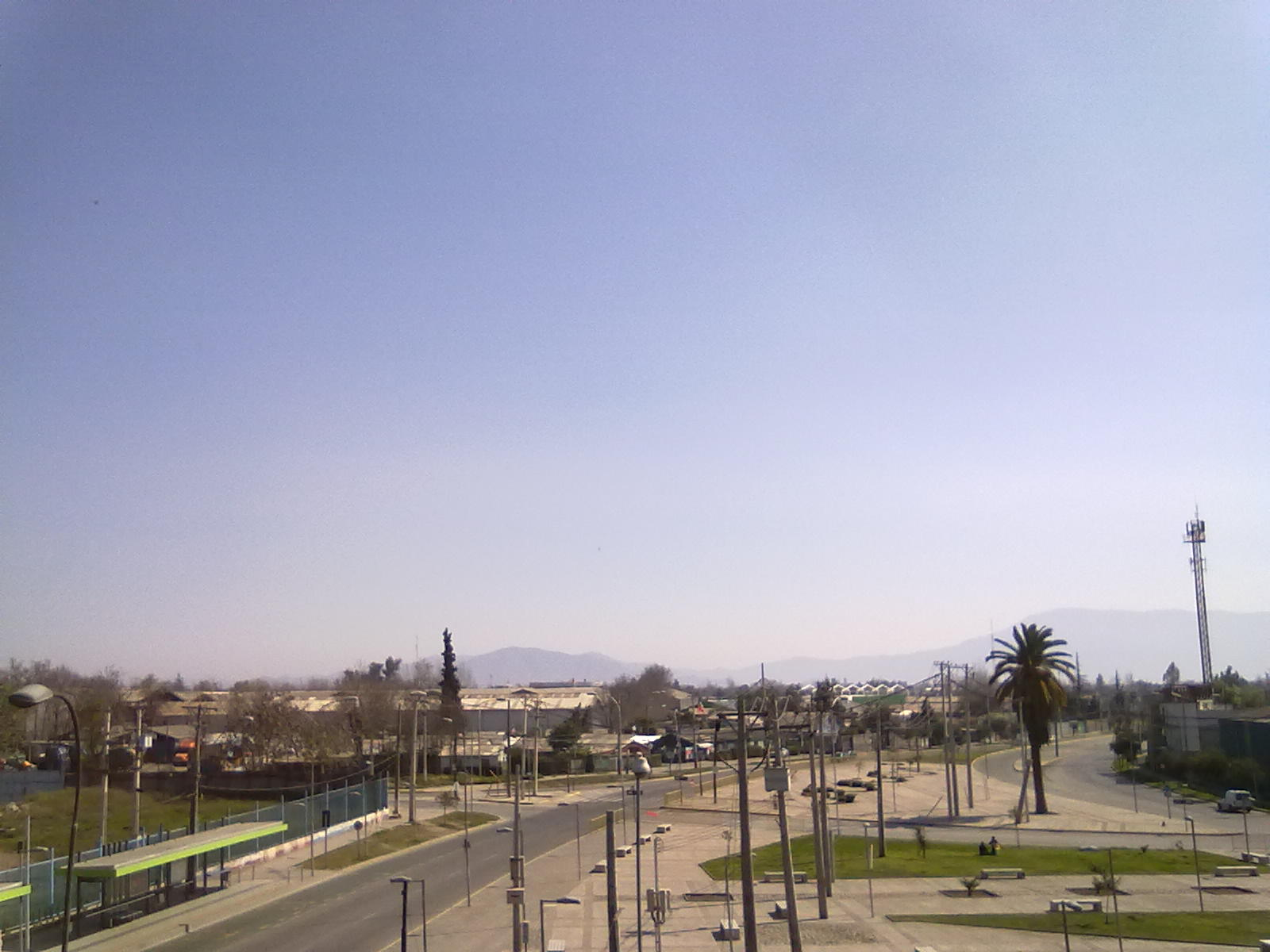 av. senador jaime guzman